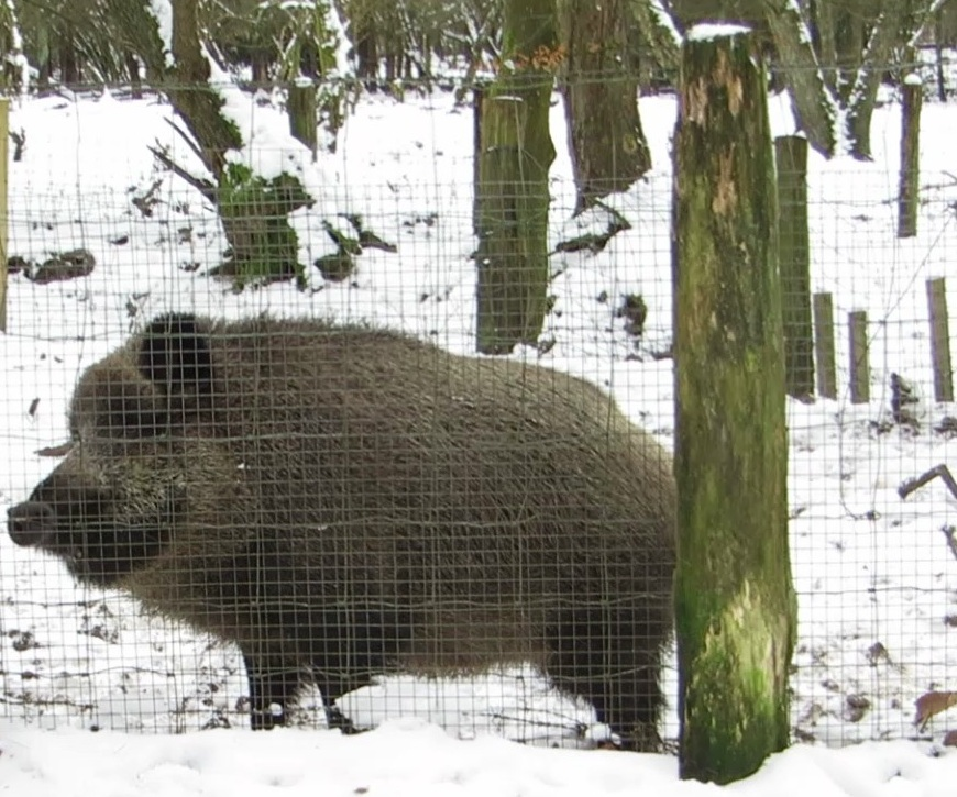 Wildschwein, Marienhölzung, Flensburg, Januar 2013